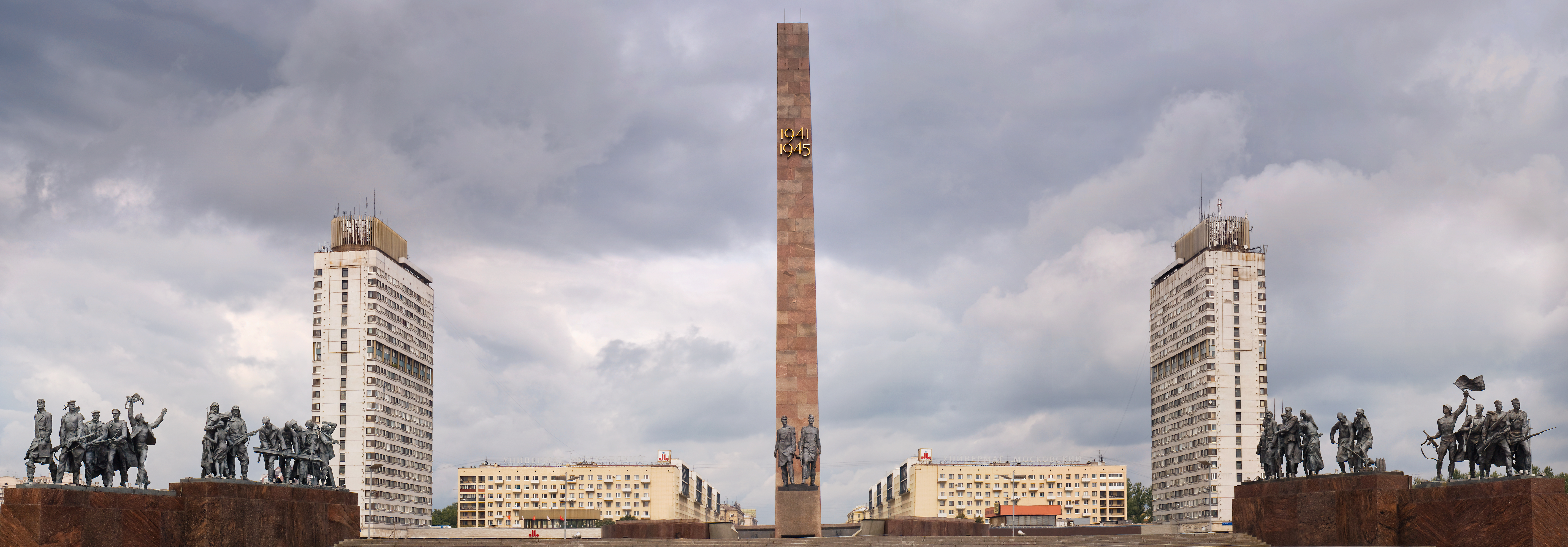 Монумент героическим защитникам Ленинграда: в центре площади Победы, Московский район, Санкт-Петербург